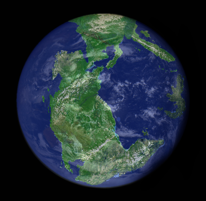 Interpretación artística del aspecto de la Tierra a comienzos del periodo Triásico.